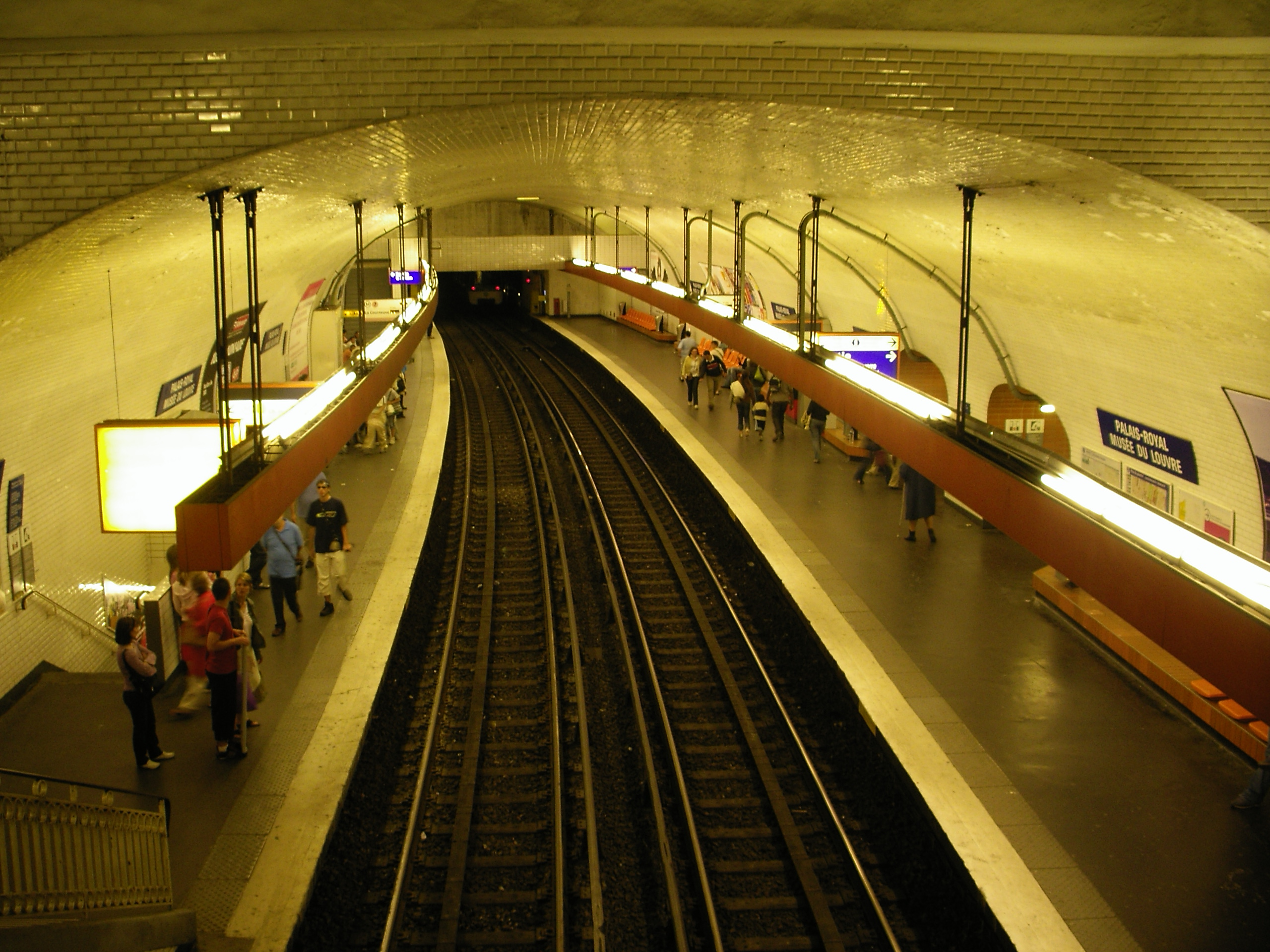 zelfgemaakte foto